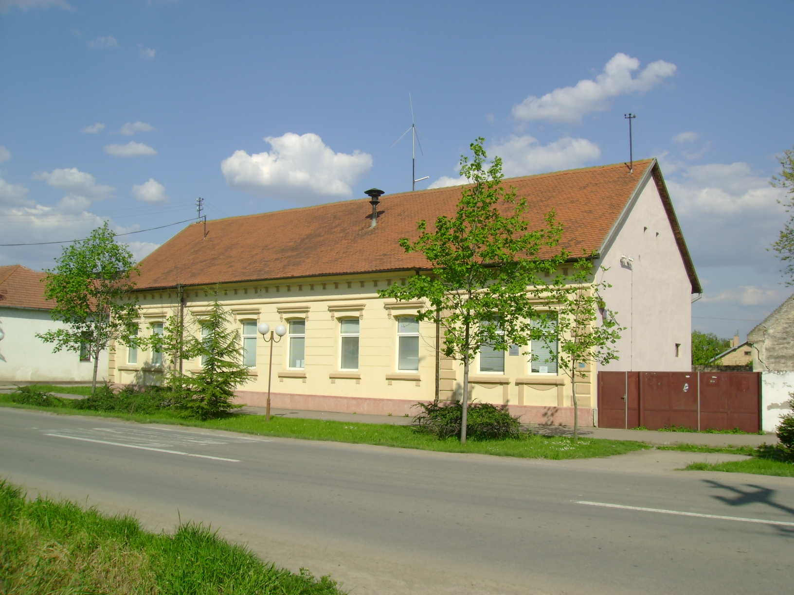 Зграда Месне заједнице